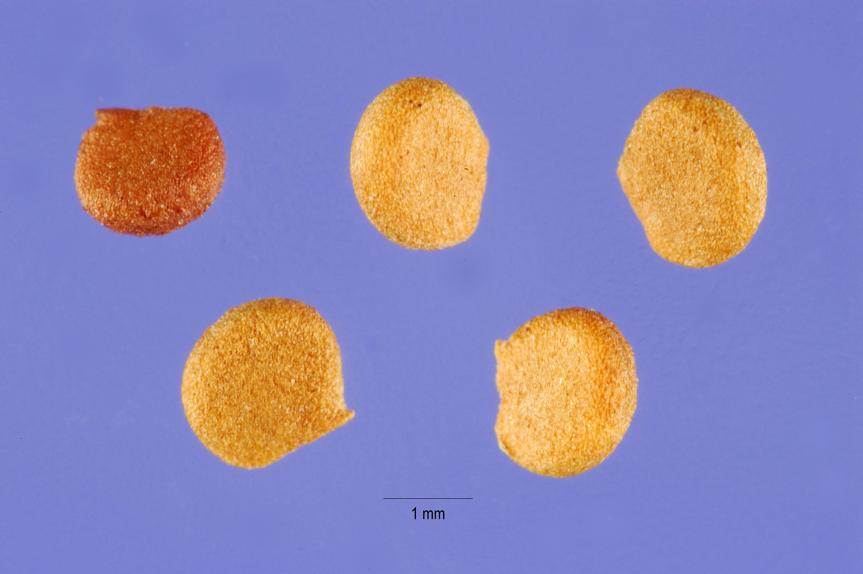 Empetrum nigrum seeds